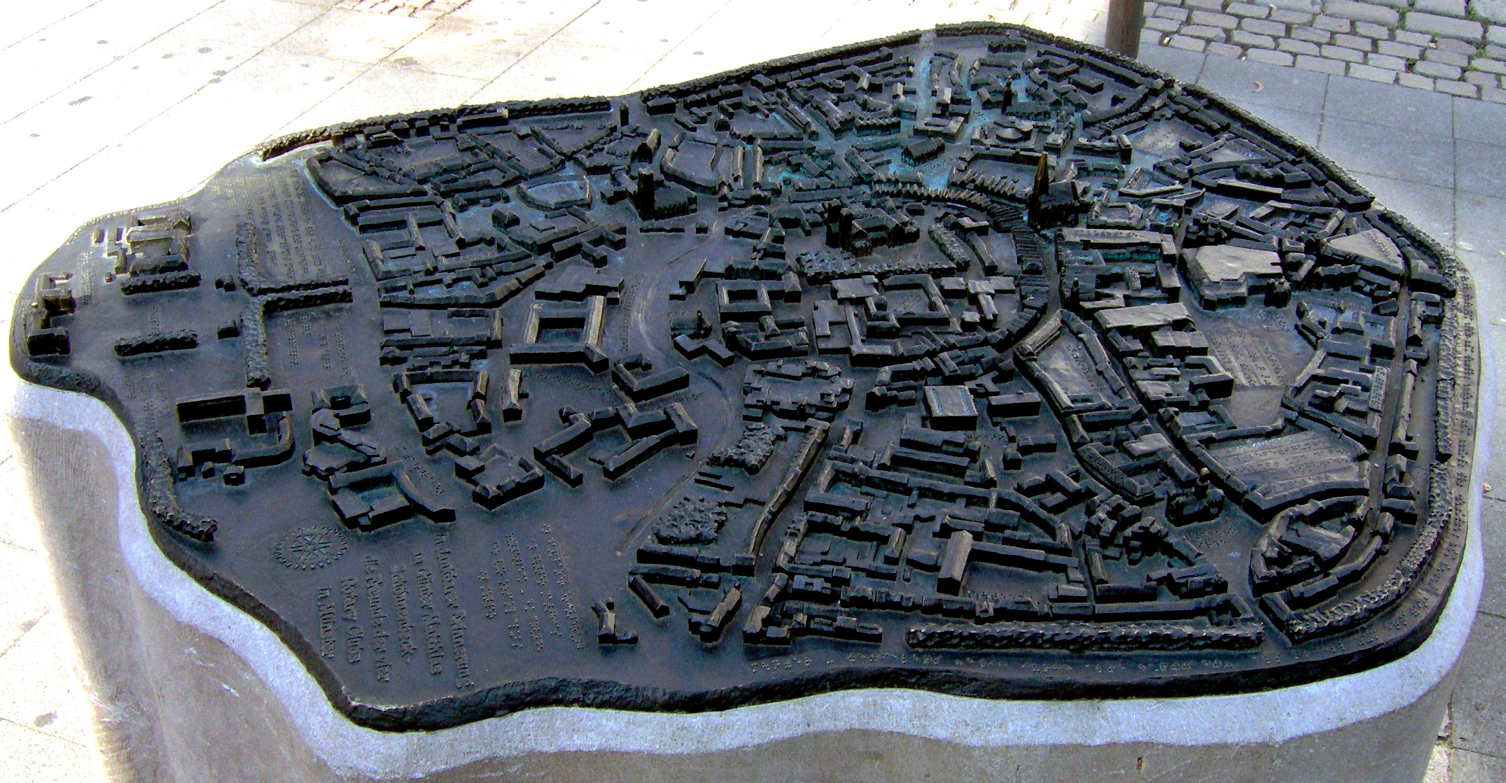 Modell der münsterschen Innenstadt